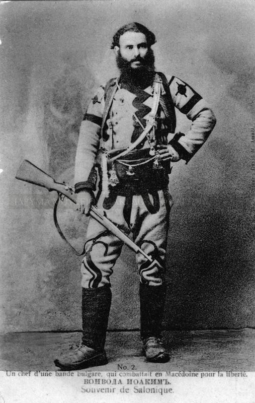 Кимон Георгиев (?-1908)